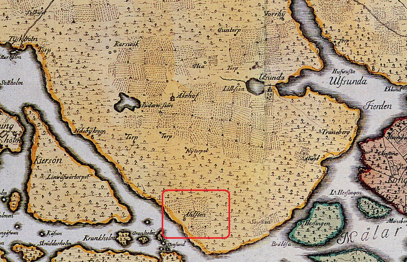 Del av Georg Biurmans karta över Stockholm med omgivning, som visar Brommalandet med Åhlstens gård